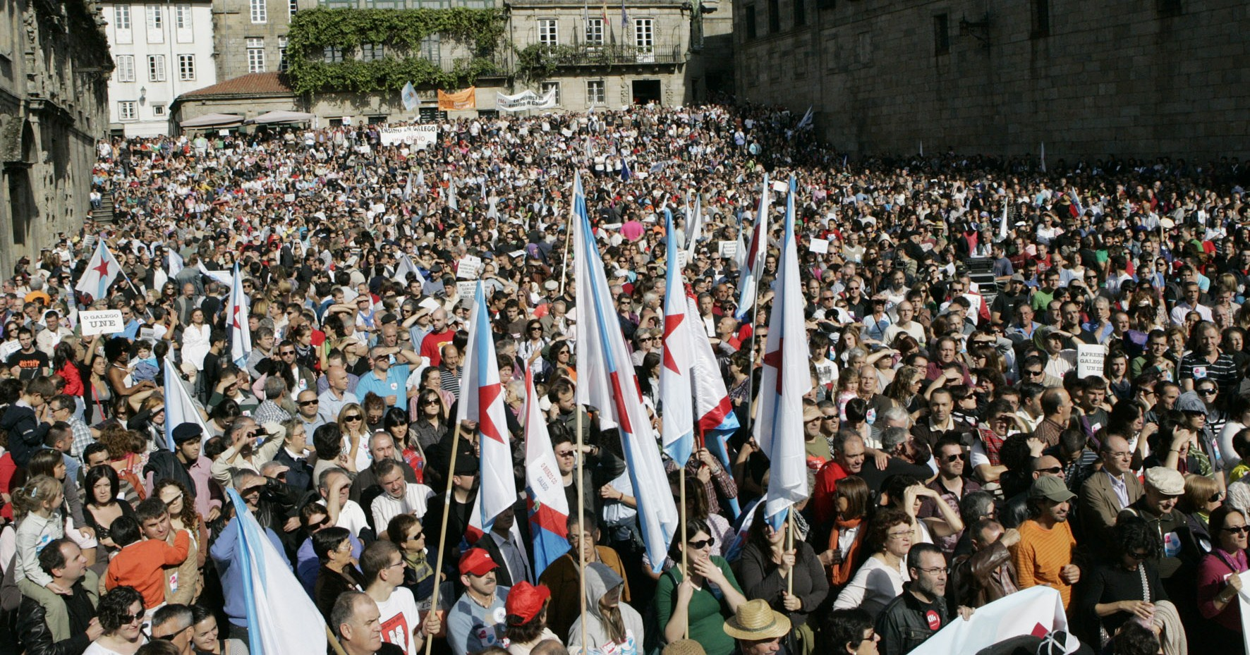 Queremos Galego. Galicia (Spain)